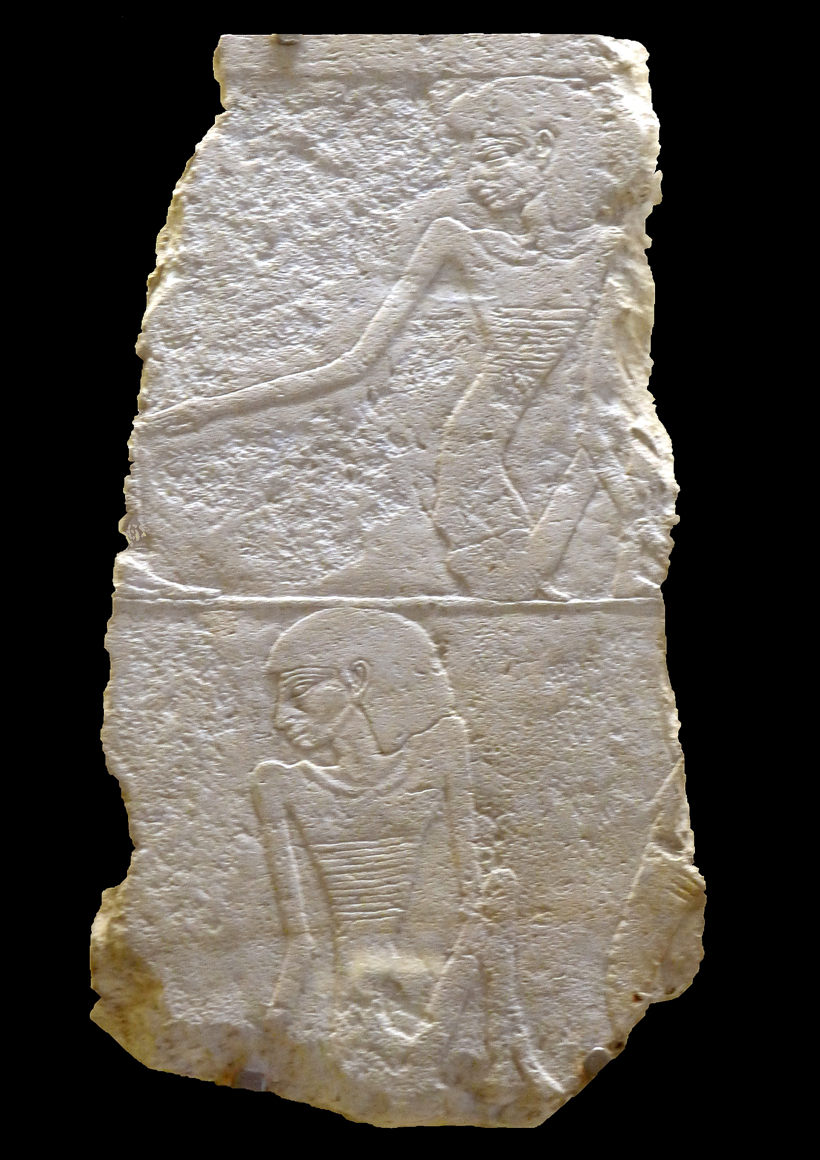 Bédouins mourant de faim dans le désert aux confins de l’Egypte.